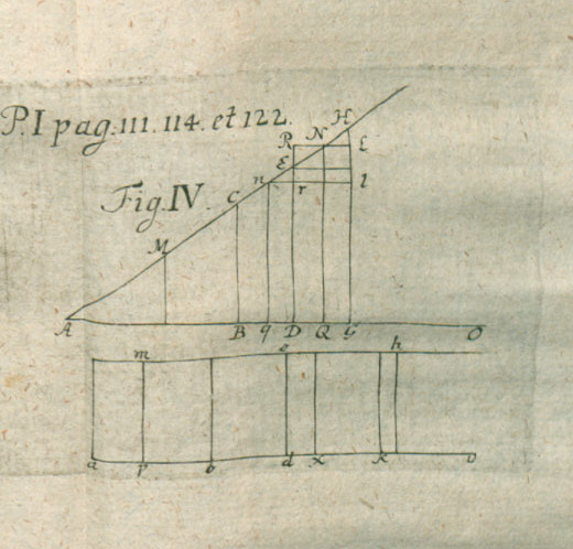 Illustration